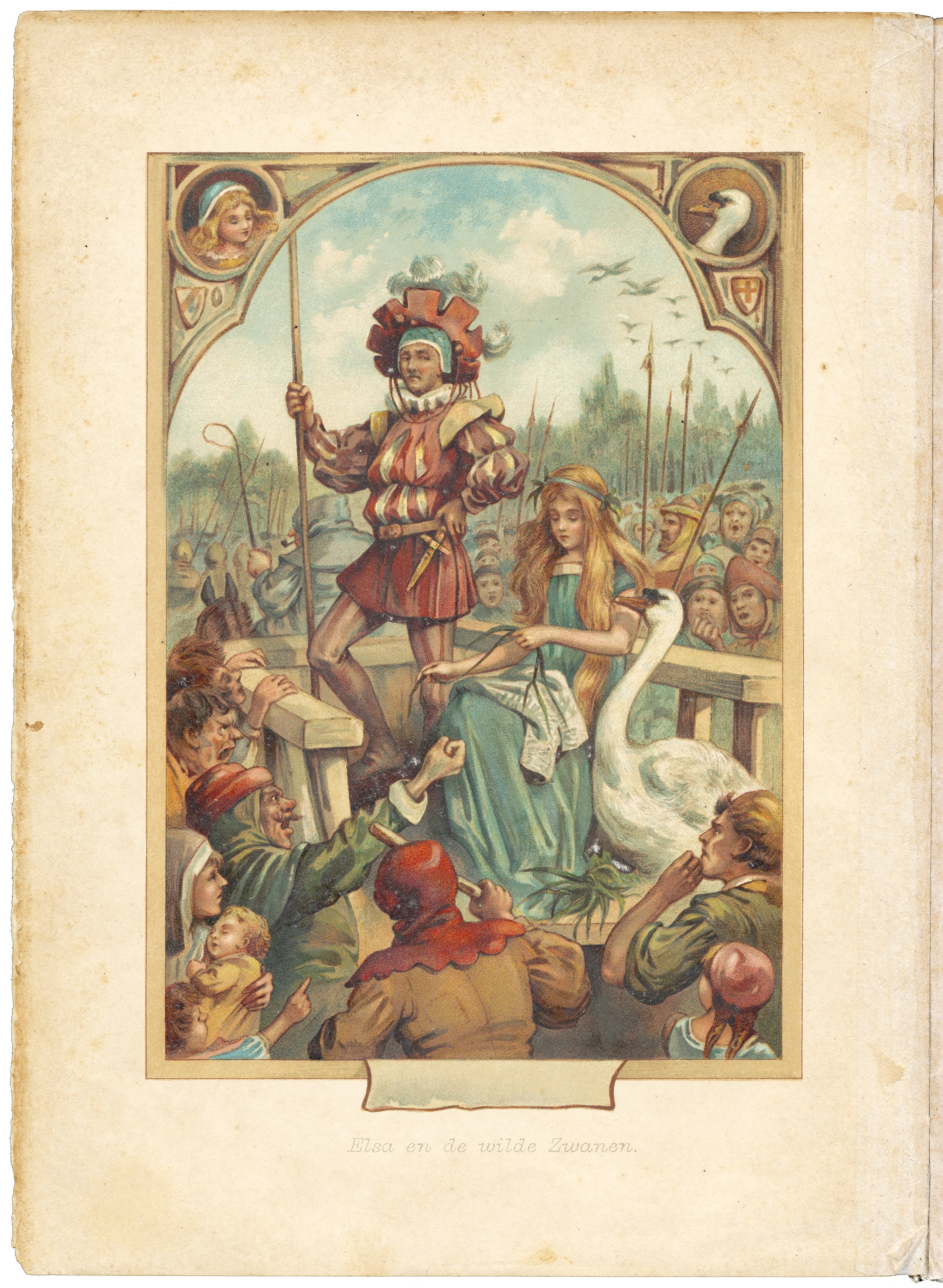 Sprookjes van Hans Andersen, deel 1 / uit het Deensch vert. door Christine Doorman; [ill. van E. Stuart Hardy]. - Utrecht : De Haan, [1899-1900]. Image uploaded on 02-10-2013 from the Flickr stream of the Royal Library, The Hague (Koninklijke Bibliotheek, KB, national library of the Netherlands)